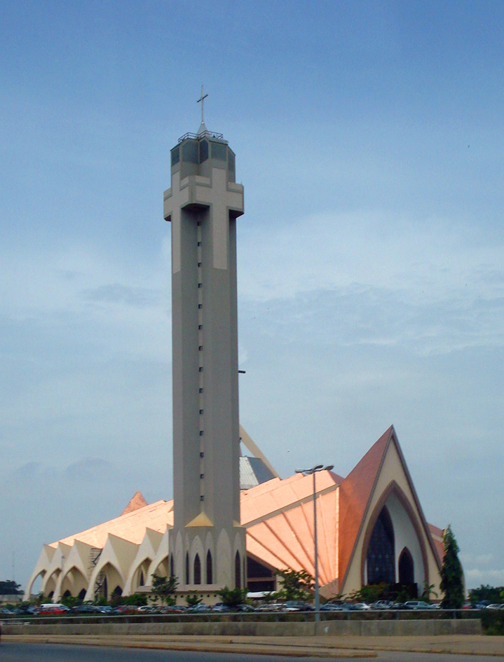 Catedral Nacional em Abuja, Nigéria